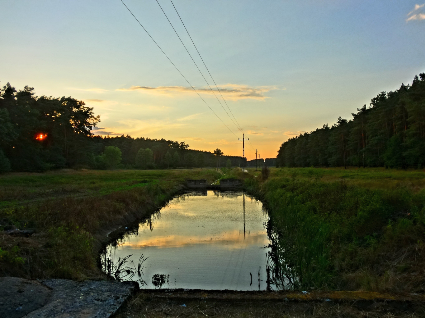 Struga Młyńska – dopływ Kanału Bydgoskiego w dolinie Podprądy na styku gminy Białe Błota i osiedla Miedzyń w Bydgoszczy